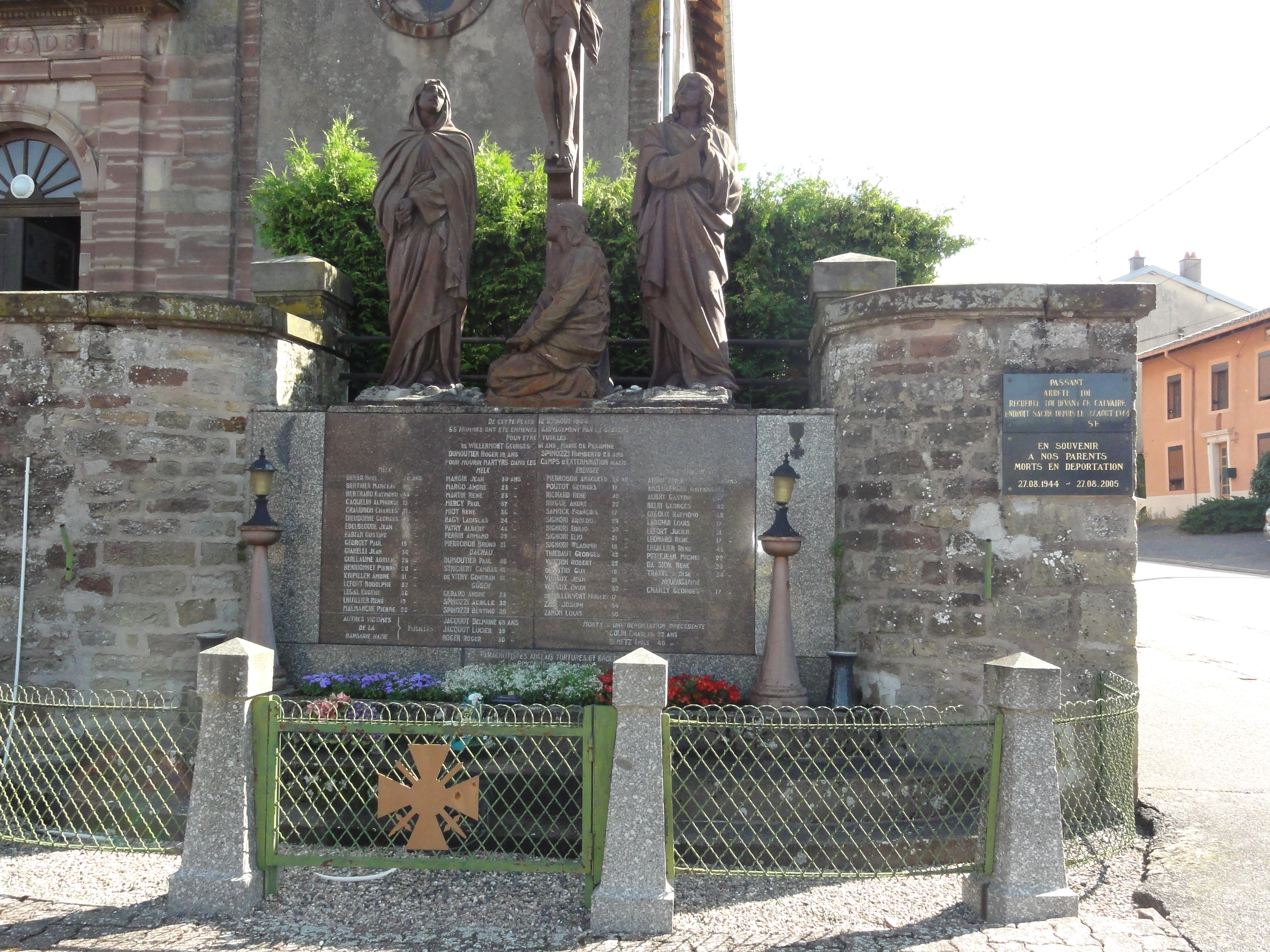 Pexonne (M-et-M) calvaire, monument 65 civils fusillés et plaques commemoratives